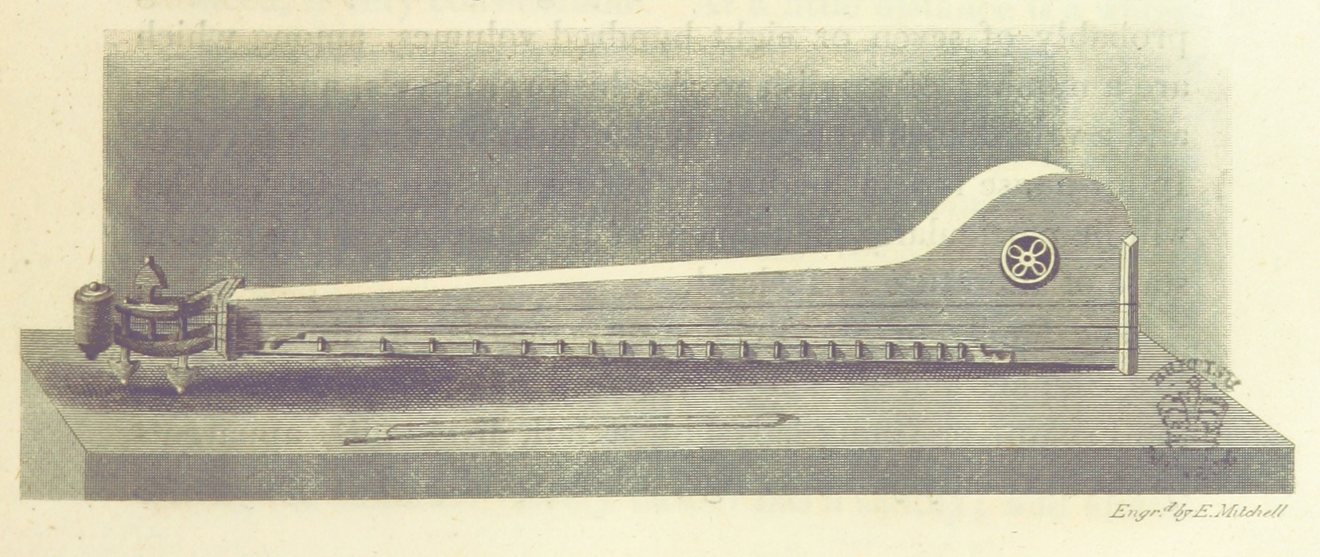 Zeichnung eines Langspils mit einer Melodiesaite und zwei Bordunsaiten, sowie einem kurzen Bogen. Aus: Travels in the Island of Iceland, during the summer of the year 1810 von Sir G. S. Mackenzie [assisted by H. Holland and R. Bright], Seite 183.